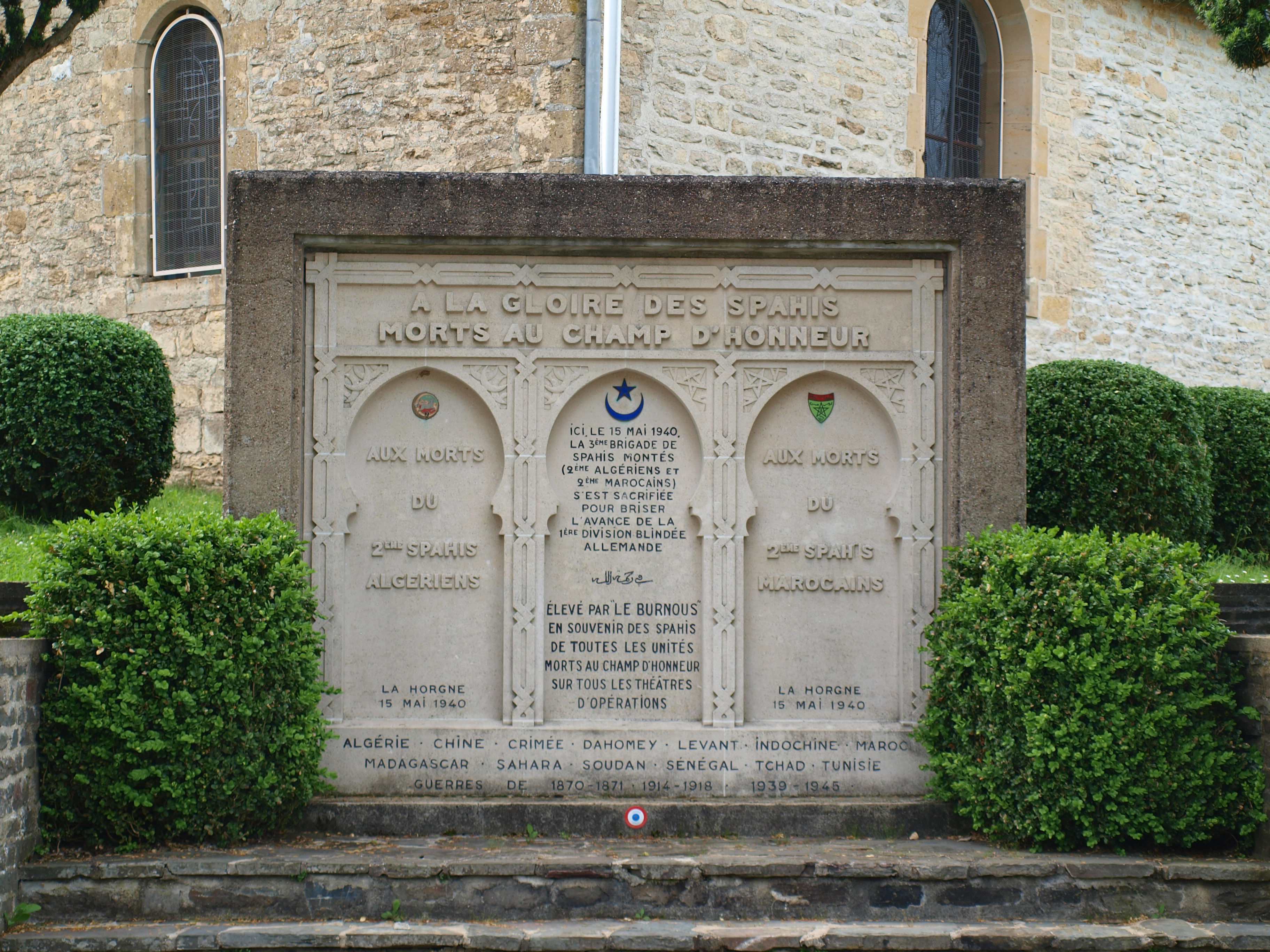 La Horgne (Ardennes, France) ; monument aux spahis de toutes les guerres.